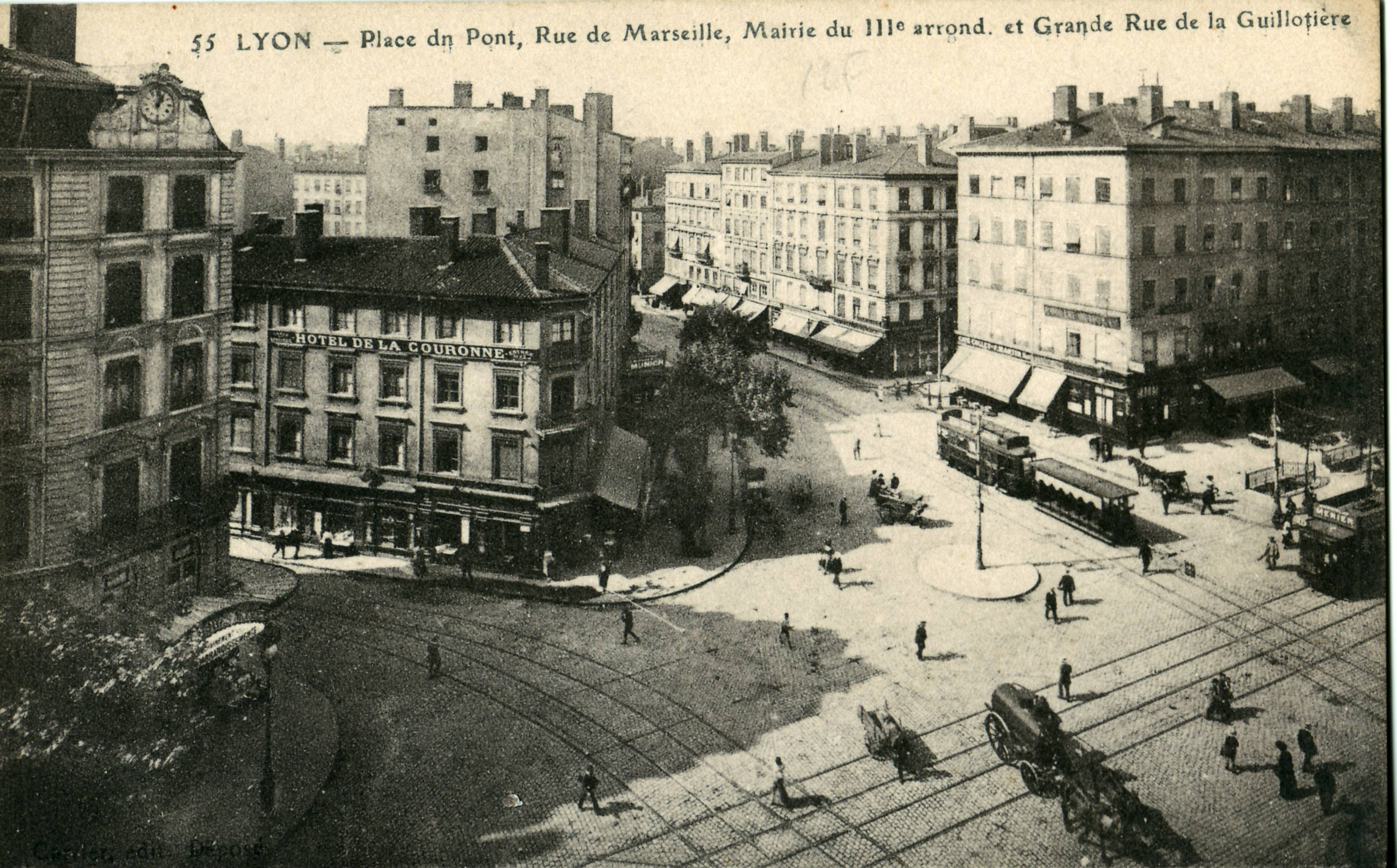 Carte postale ancienne, éditée probablement par Combier (le nom est très difficilement lisible) n°55LYON : Place du Pont, Rue de Marseille, Mairie du IIIe arrondissement et Grande rue de la Guillotière